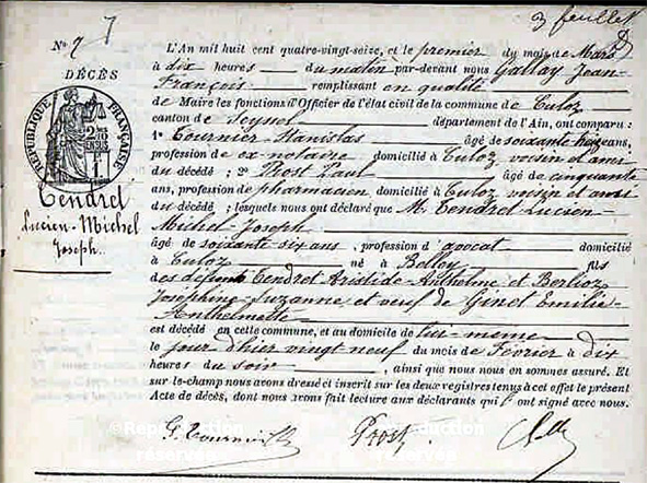 acte de décès montrant bien qu'il est mort à 66 ans et ne peut pas être né en 1825